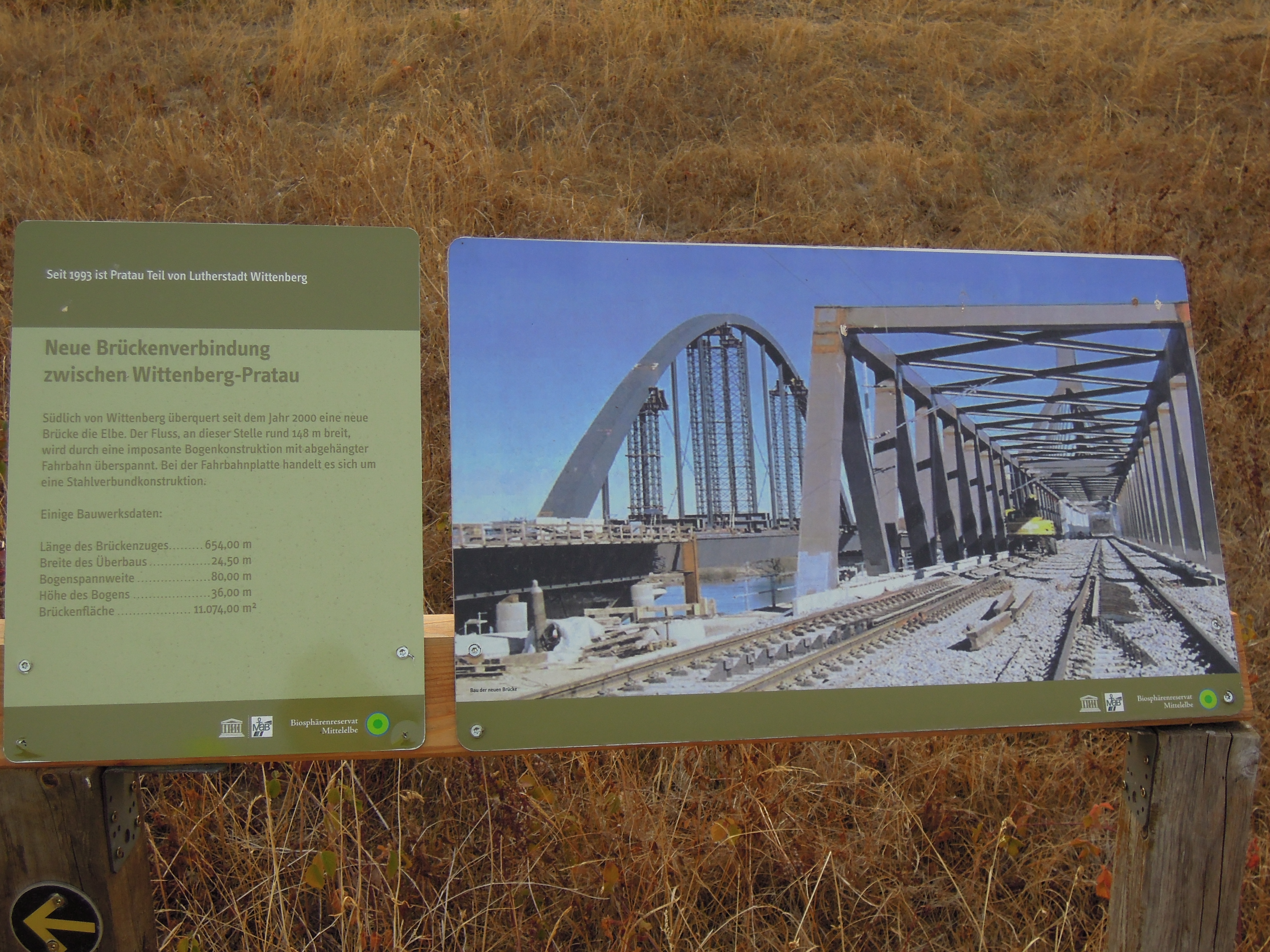 Elbebrücken südlich Wittenberg -Tafel mit technischen Daten in den Elbwiesen des Biosphärenreservats Mittelelbe